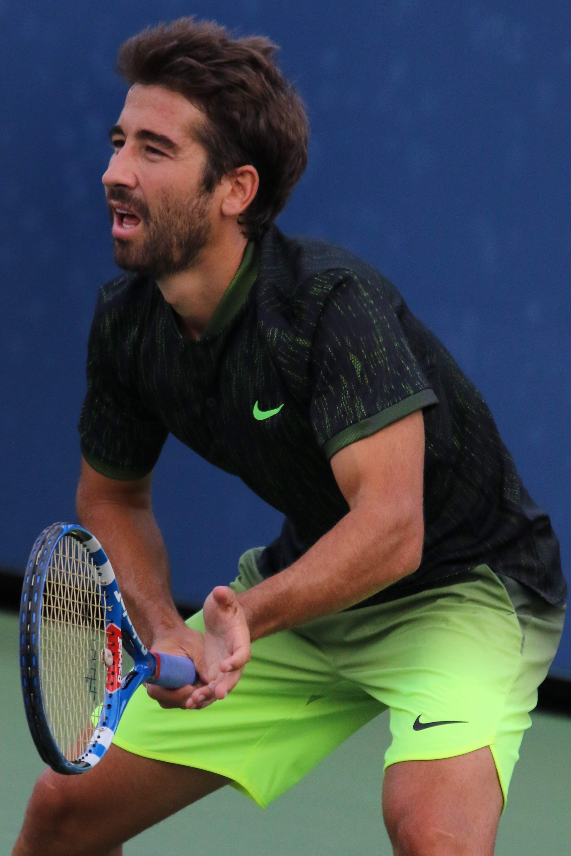 Lopez M. US16 (20)